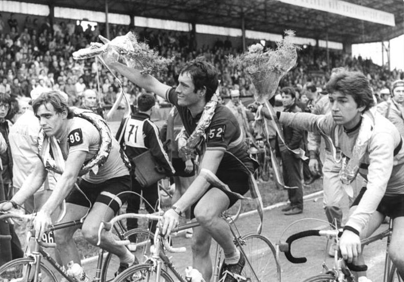 Juri Zajak, Jacky Hardy, Willy Sprangers ADN-ZB Reiche 20.5.1977 Sokolov: 30.Internationale Friedensfahrt. Einen französischen Etappensieg gab es am 20.5.77 in Sokolov am Ziel zwölften und vorletzten Tagesabschnitts der Jubiläumsfahrt durch den 23 jährigen Jaocky Hardy (Mitte), der sich den ersten Platz vor Willy Sprangers (Belgien ,rechts) und dem noch bei der Einfahrt ins Stadion gestürzten Juri Zajak (UdSSR) holte.